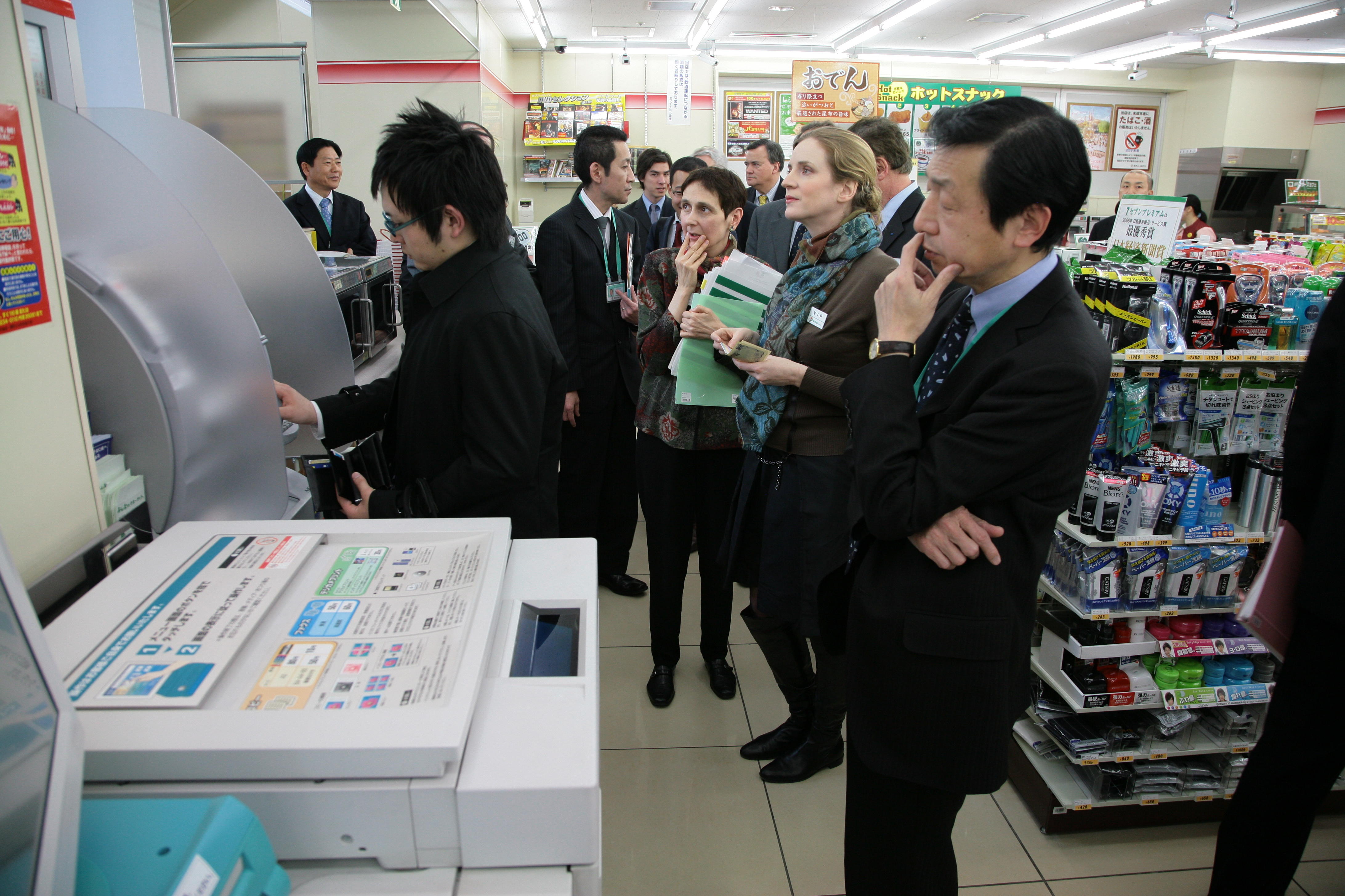 Photo : Olivier Ezratty Déplacement au Japon en février 2009.